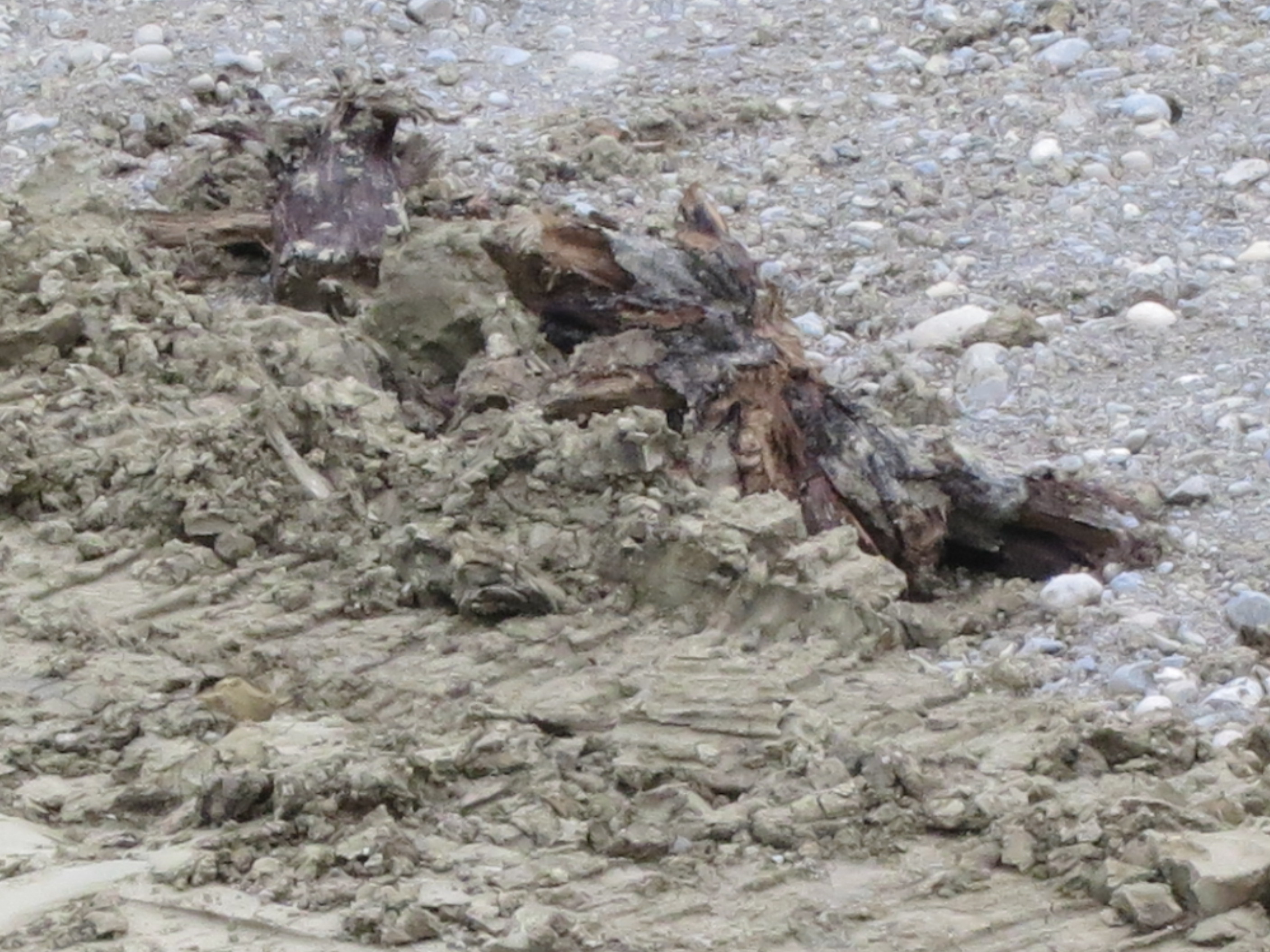 Urzeitwald Binz, Zürich-Wiedikon, Schweiz